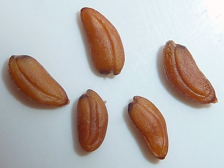 Cakile maritima (Oruga de mar) : Semillas sueltas - Dique de la Rambla de Cañarete, Águilas (Murcia, España).